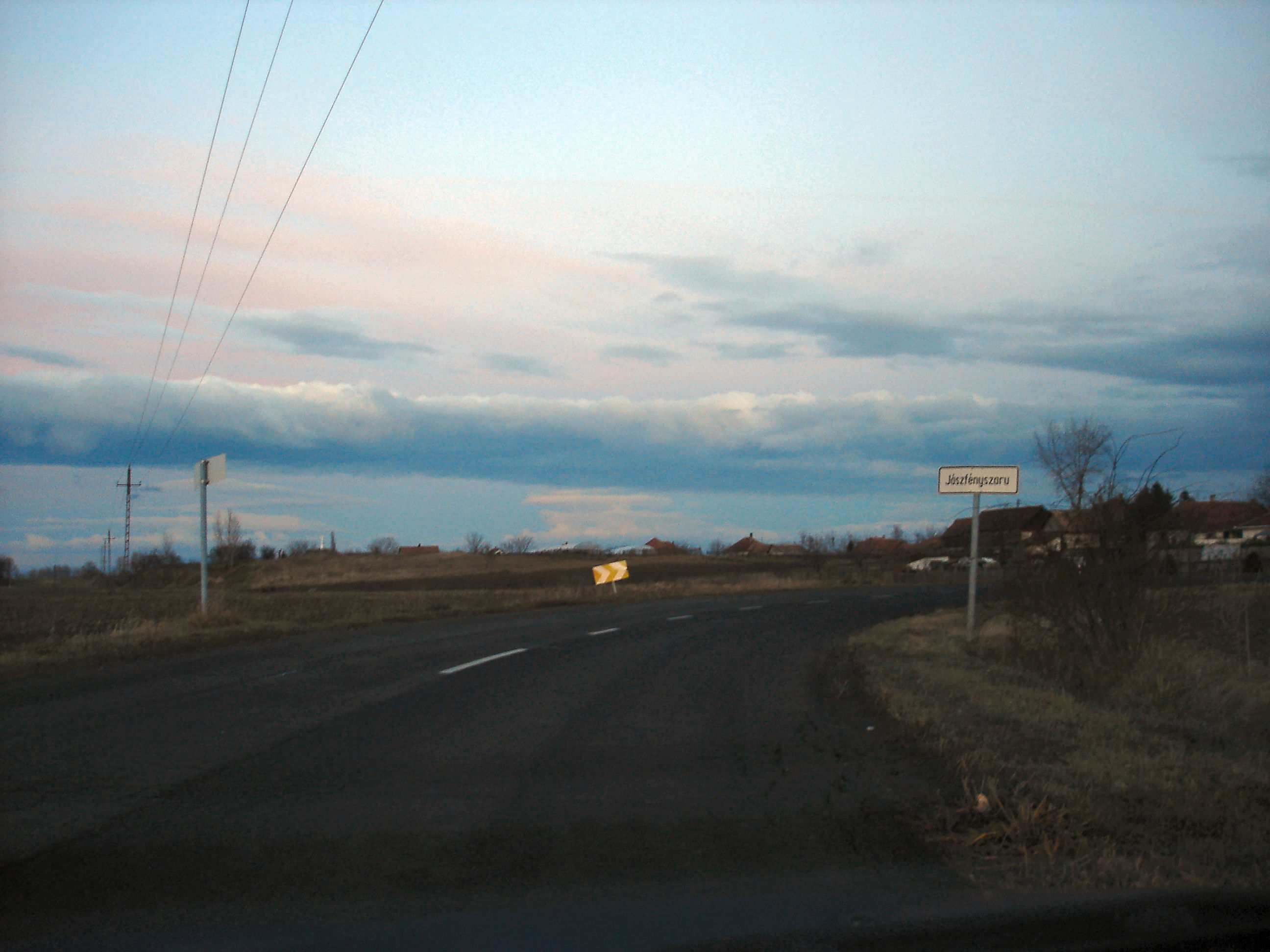 Jászfényszaru Boldog felől érkezve